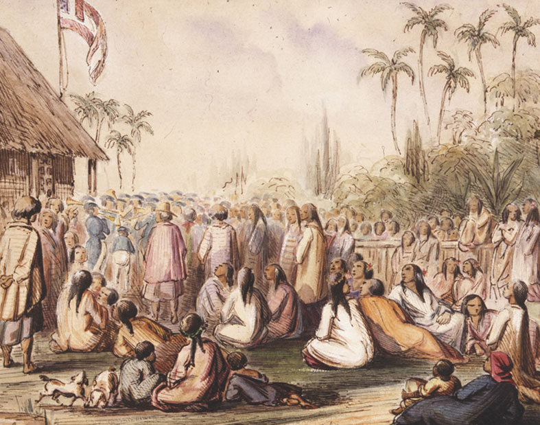 Proclamation du protectorat. Le 10 septembre 1842 le pavillon du protectorat est salué de 21 coups de canon. Dessin de M.Radiguet.